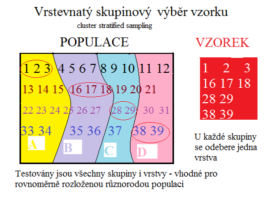 Vrstevnatý skupinový výběr